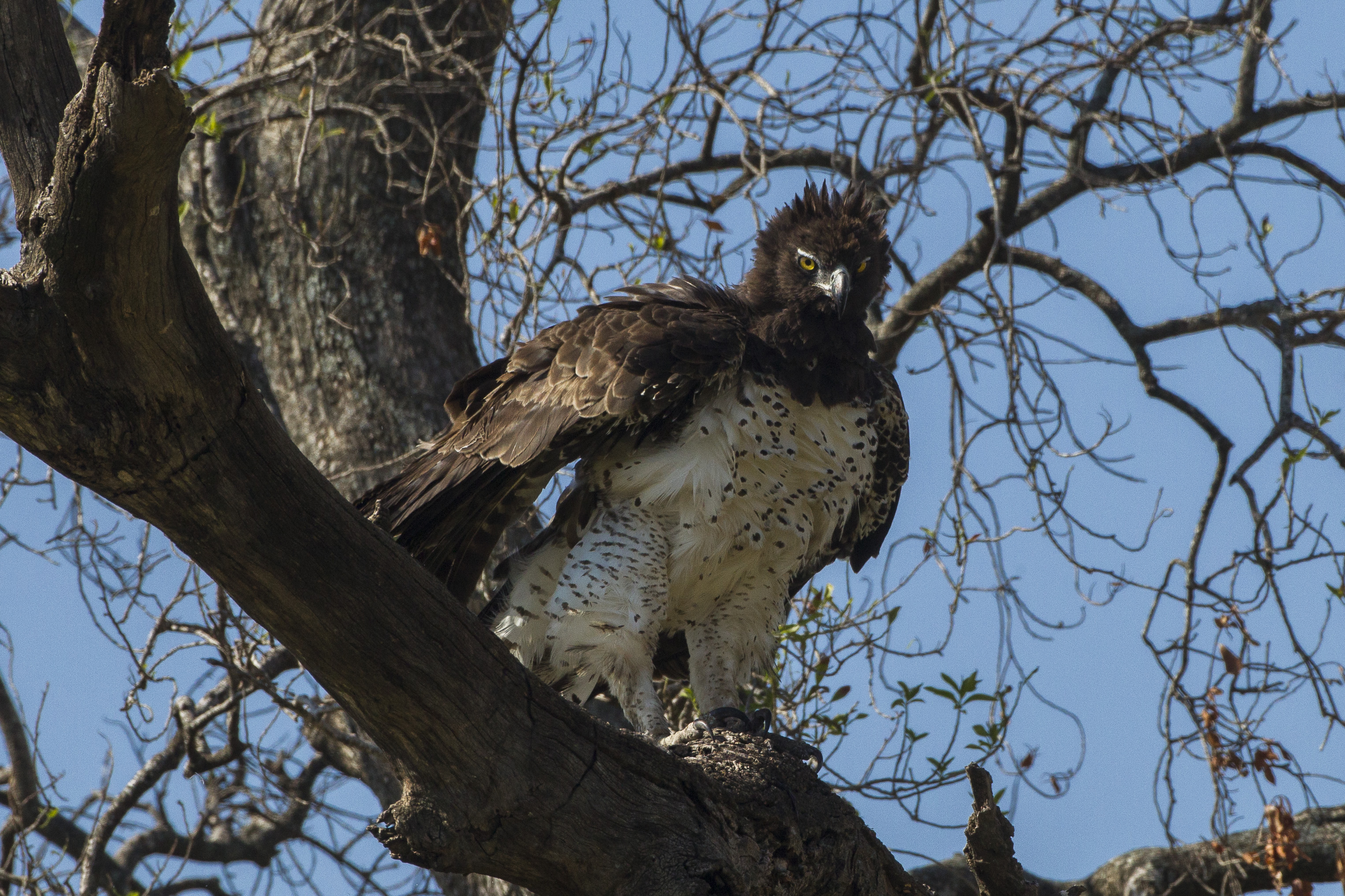 Martial Eagle - Mara - Kenya_S4E7401